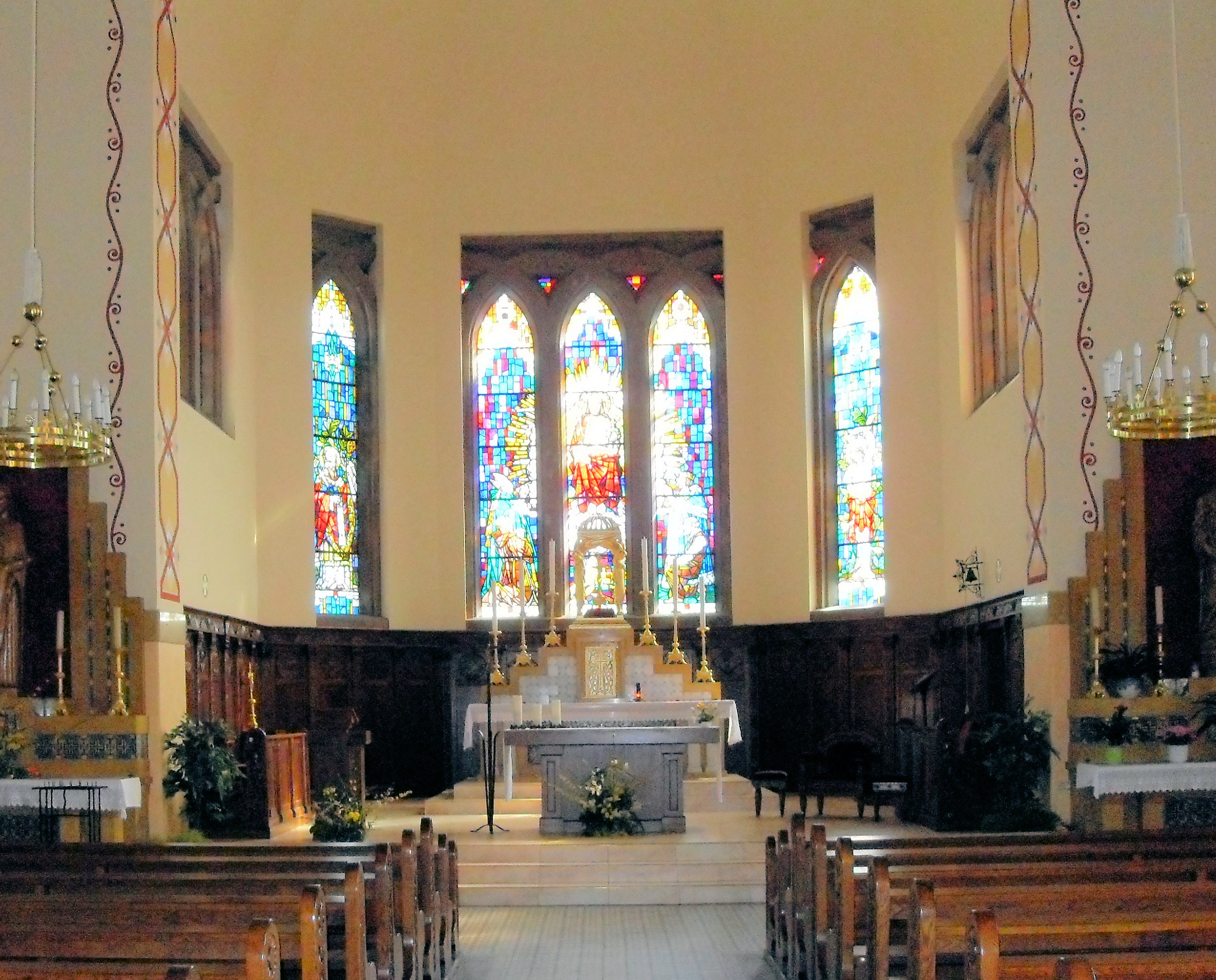 L'intérieur d'église Saint-Boniface à Burnhaupt-le-Haut